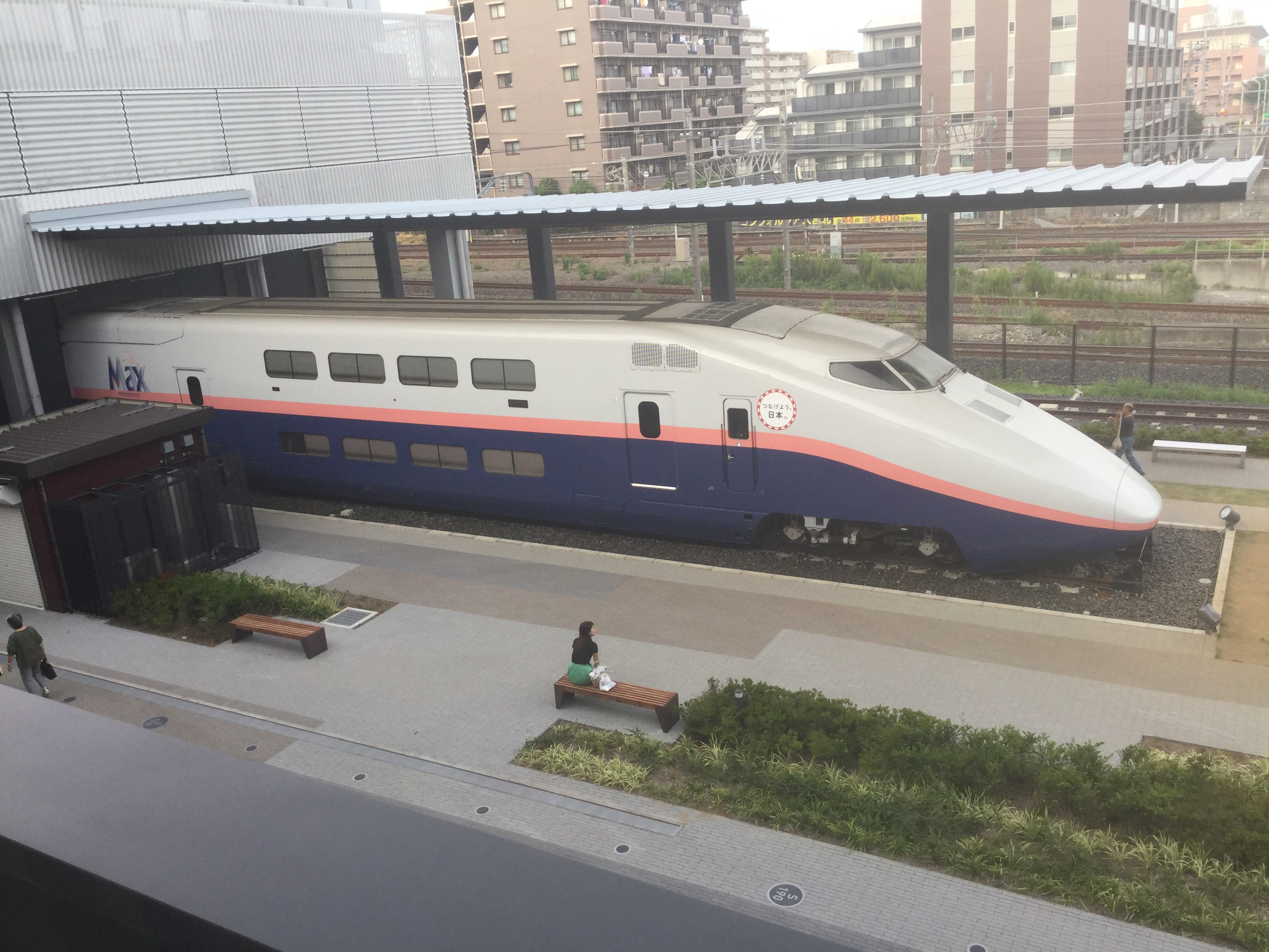 鉄道博物館に展示されているE1系M4編成。